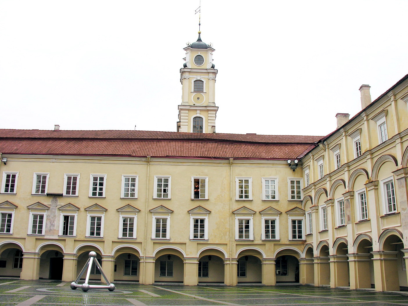 courtyaqrd at Vilniaus universitetas